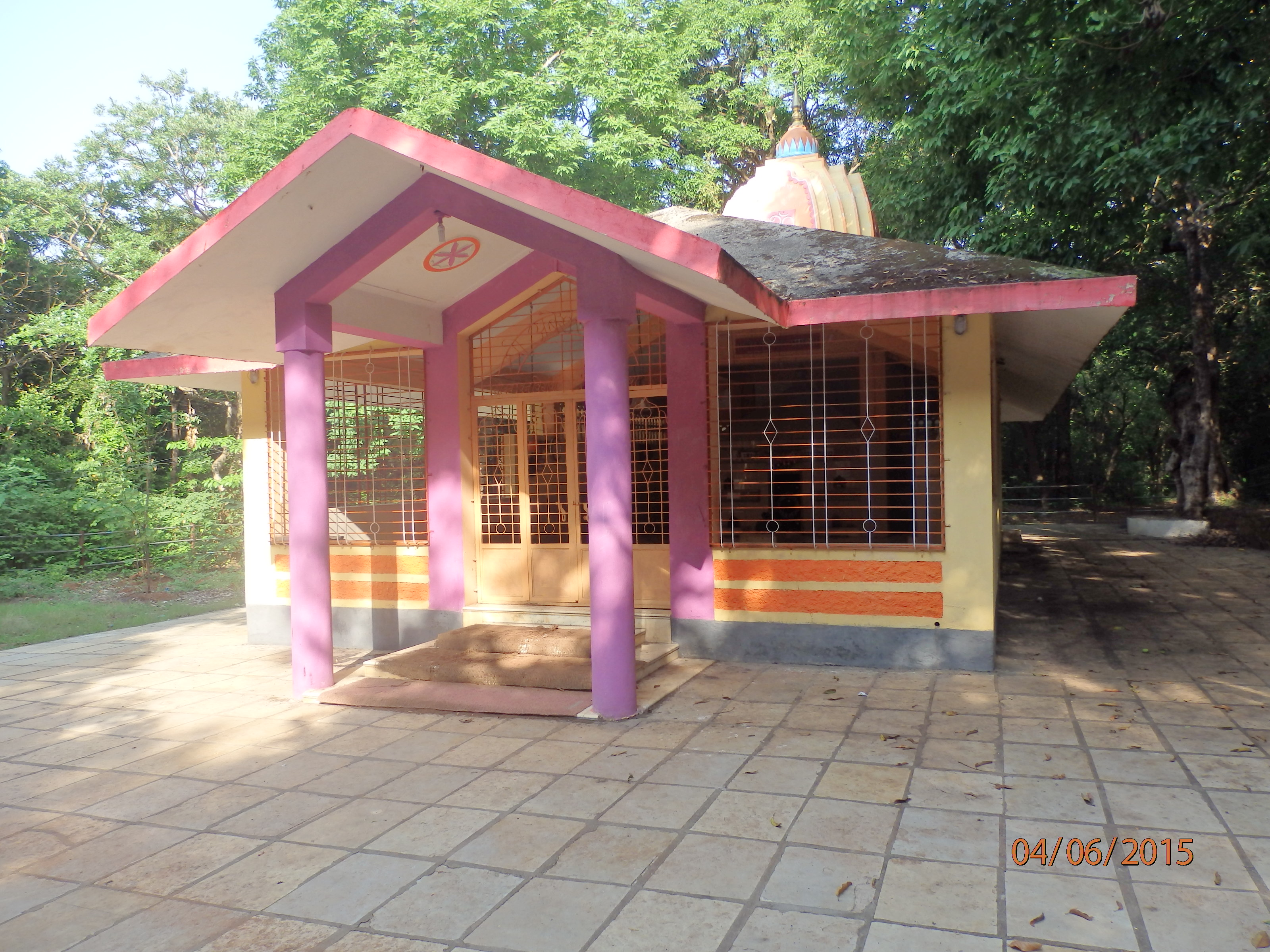 देवराईमधील आंबेश्वर मंदिर